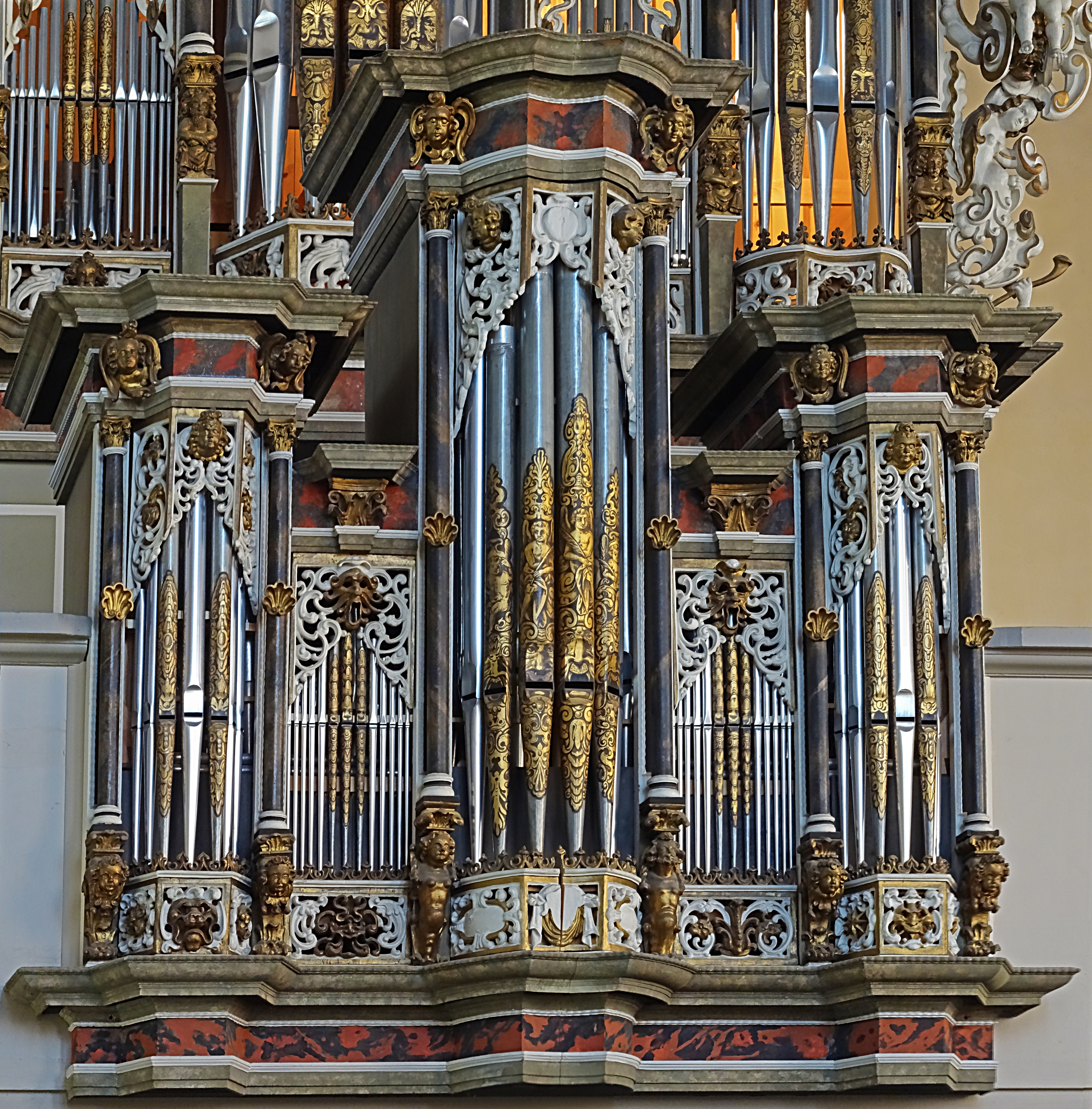 Detail Rückpositiv der Orgel in der Michaeliskirche Erfurt, einem Orgelneubau (1896 Friedrich Petersilie und 2000 W. Rühle & Sohn) im Gehäuse von Ludwig Compenius (1652).